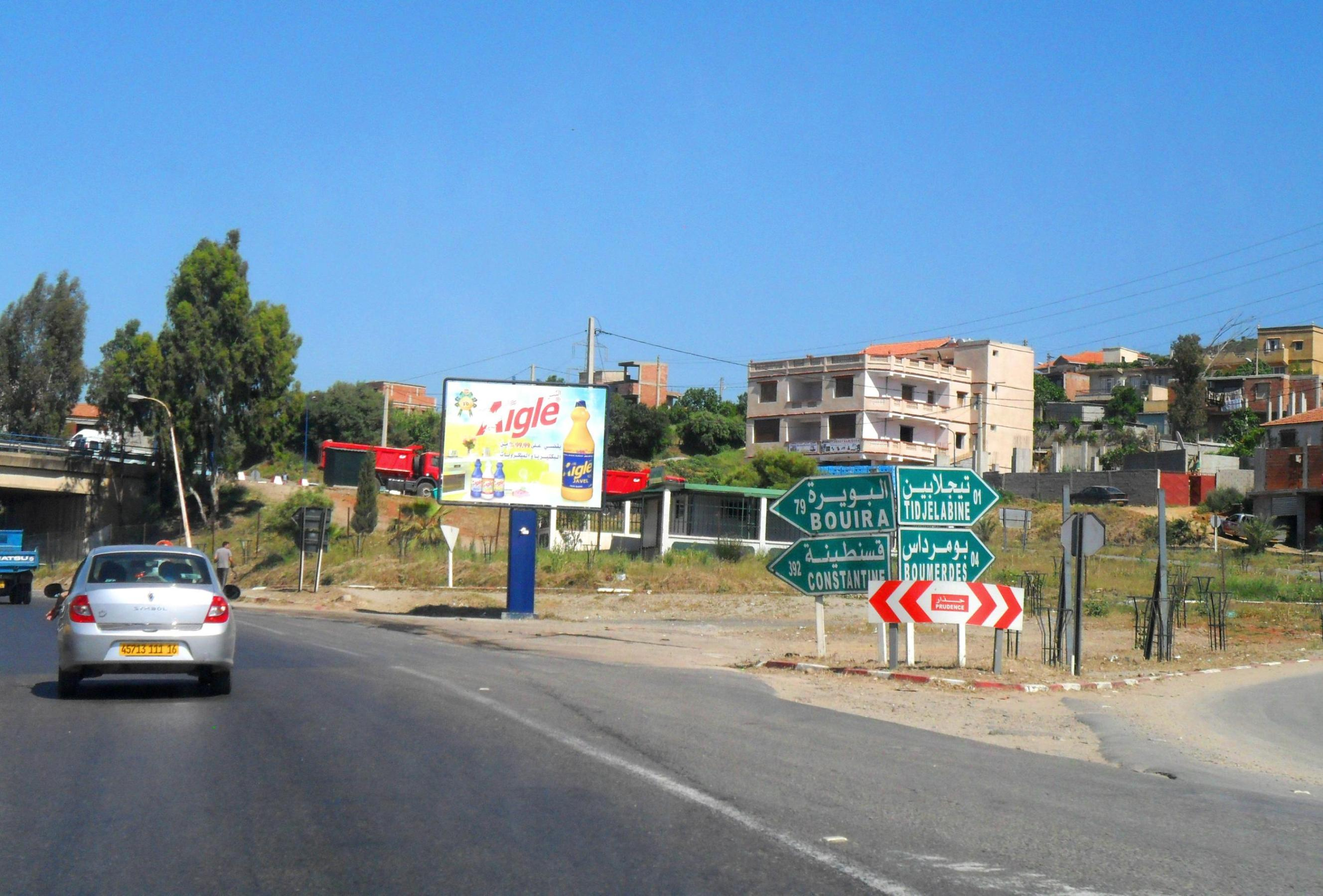 Tidjelabine تيجلابين